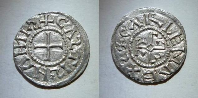 Denier de Carloman II Château-Landon. CARLEM REXS CASTIS HANNI.S Monogramme: KRLS 1.73gr - 21mm. Trésor de Gravigny- Collection H.Garnier.